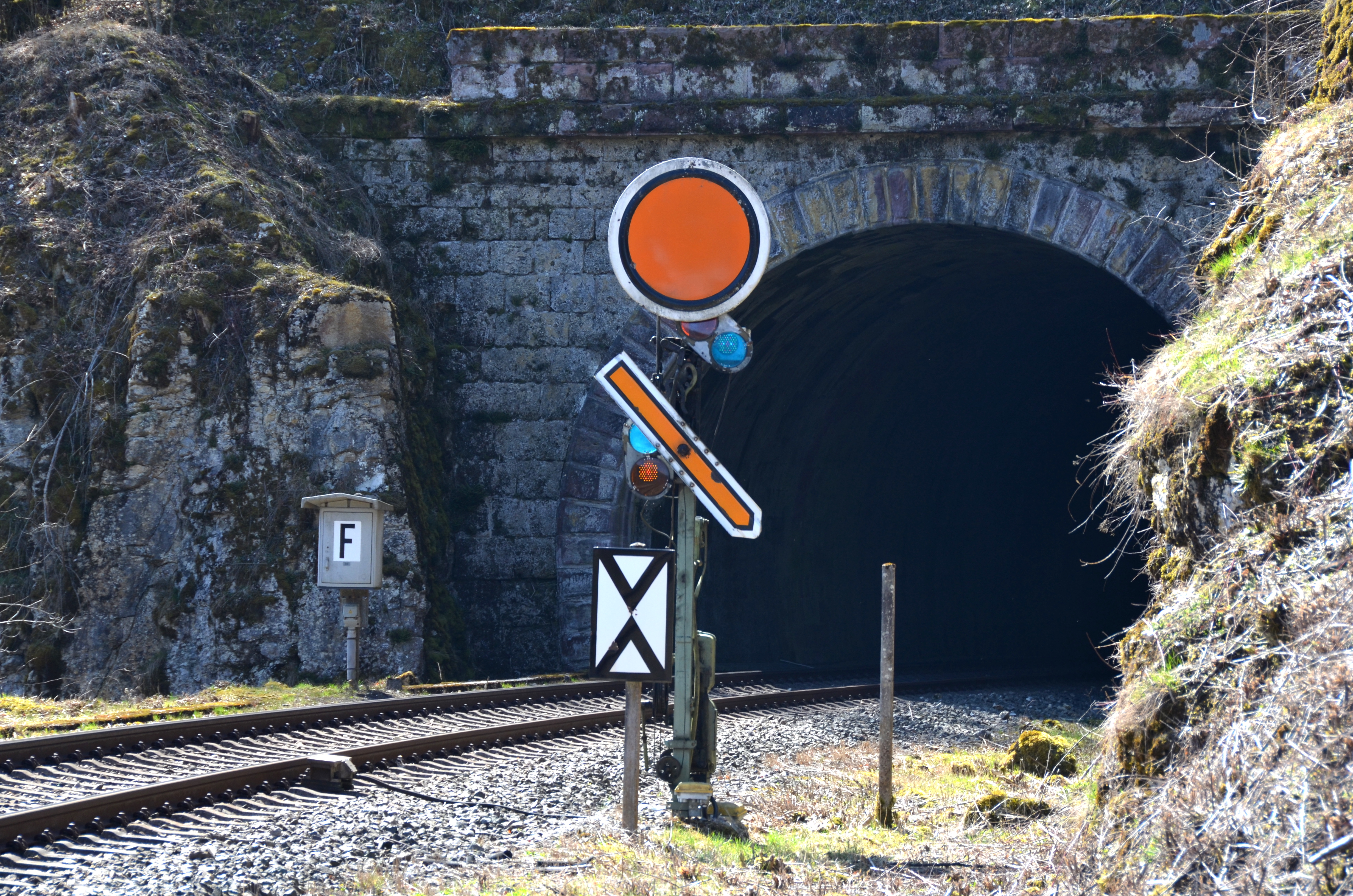 Vorsignal zum Einfahrsignal Fridingen Langsamfahrt (2018)